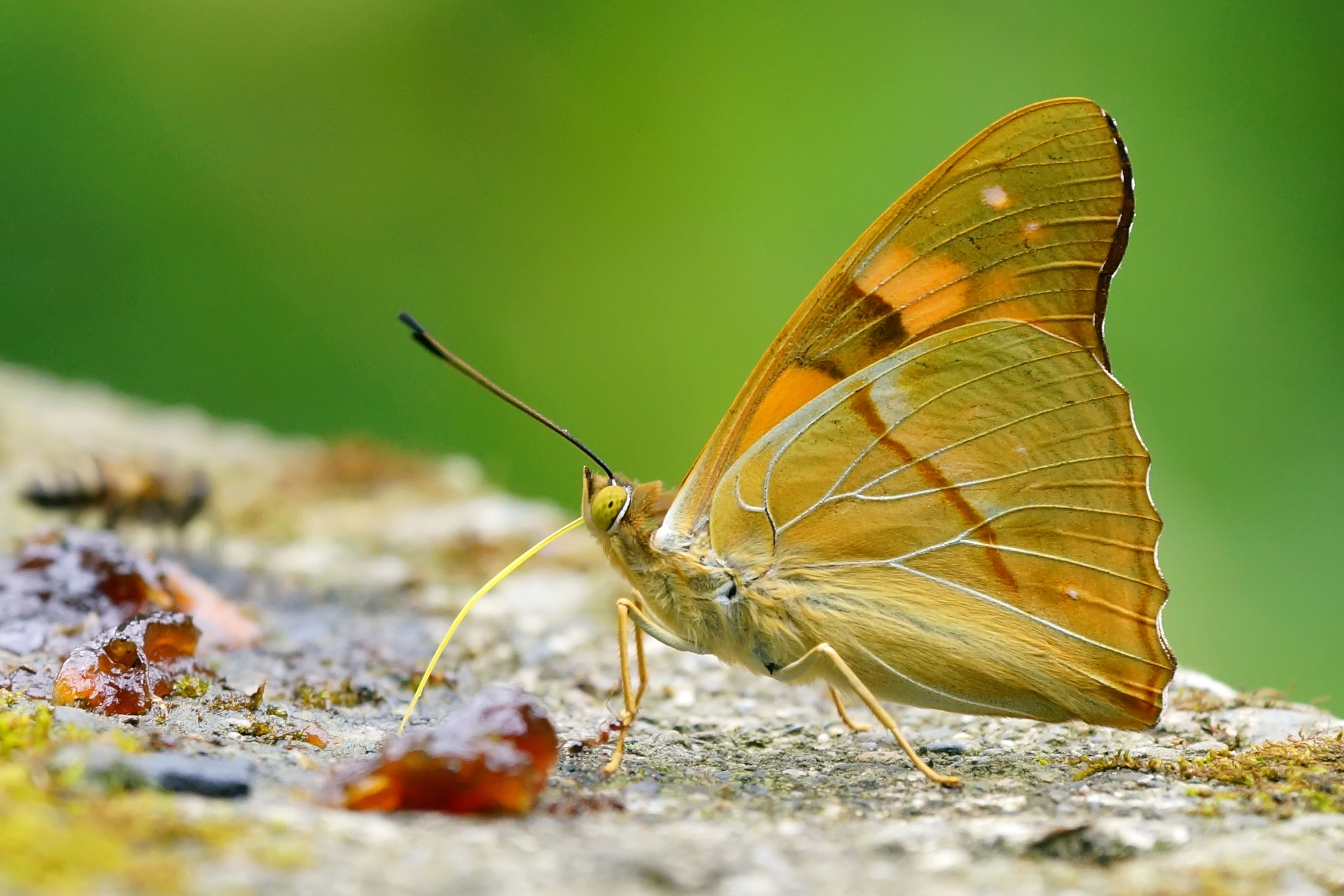 中文（台灣）: 武鎧蛺蝶 Chitoria ulupi arakii 雄